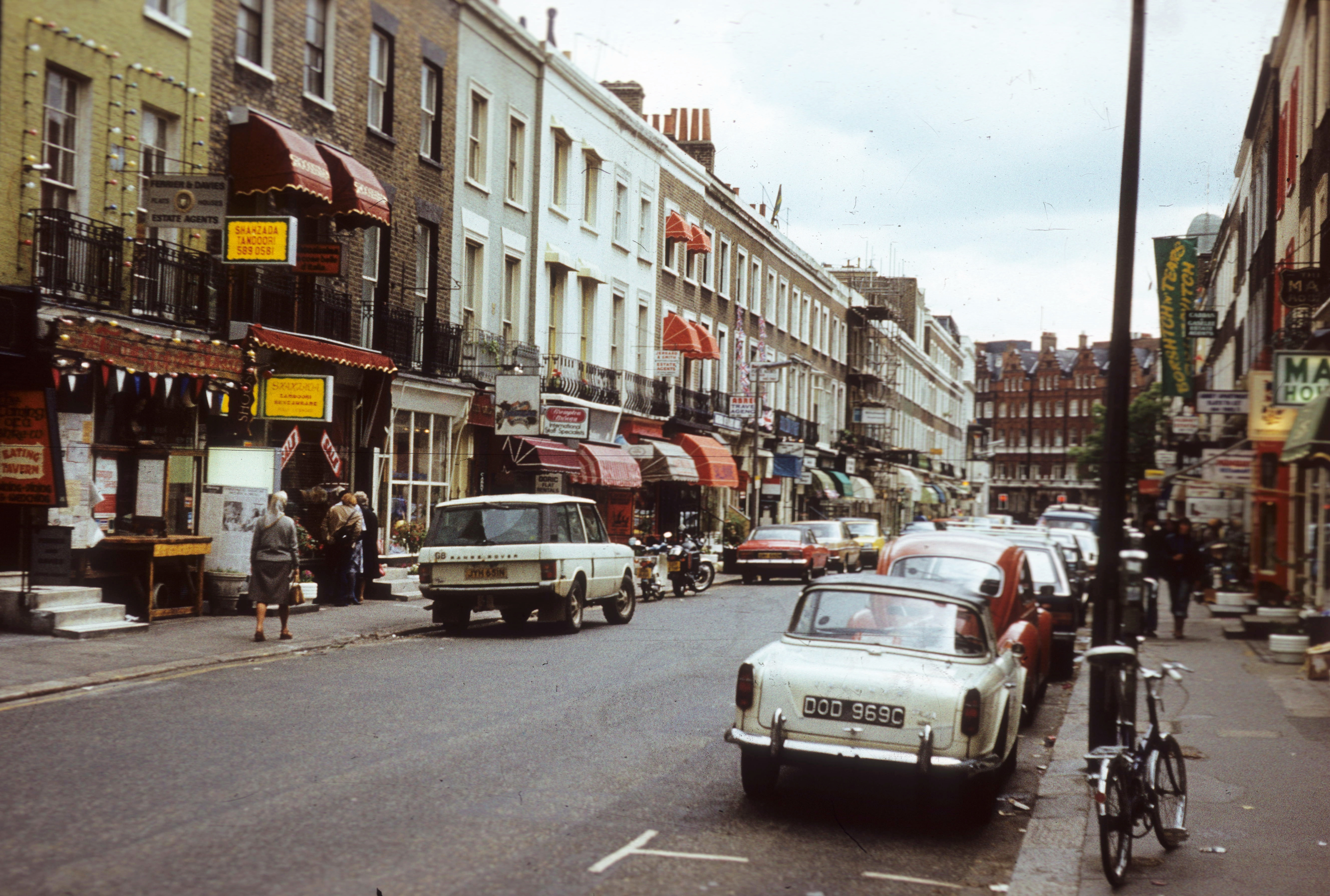 Beauchamp Place a Brompton Road felé nézve. Location: United Kingdom Tags: colorful, automobile, British brand, Land Rover-brand, bicycle, awning, number plate, country code sign Title: Beauchamp Place a Brompton Road felé nézve.